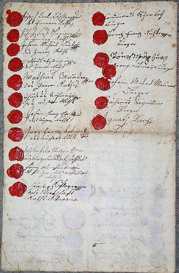 Urkunde Gründung Freistädter Bier um 1770 - Seite 2